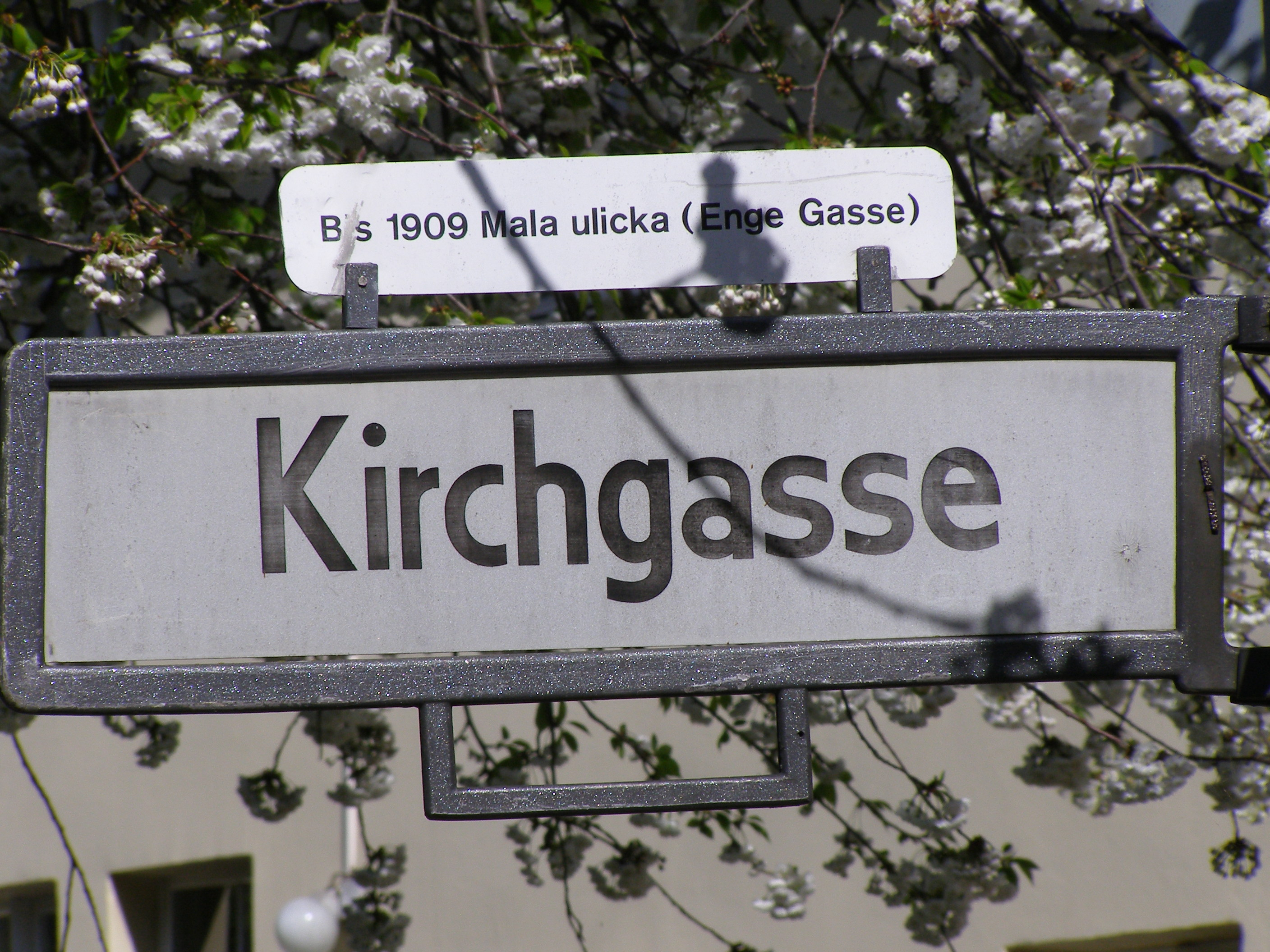 Berlin, Böhmisch Rixdorf, Strassenbeschriftung Kirchgasse, die bis 1909 Mala ulicka (Enge Gasse) hieß Berlín, Český Rixdorf, popis ulice Kirchgasse, která se až do r. 1909 jmenovala Mala ulicka (Enge Gasse) Berlin, Bohemian Rixdorf, old names of the streets (the Kirchgasse has been called in Czech Mala ulicka until 1909)